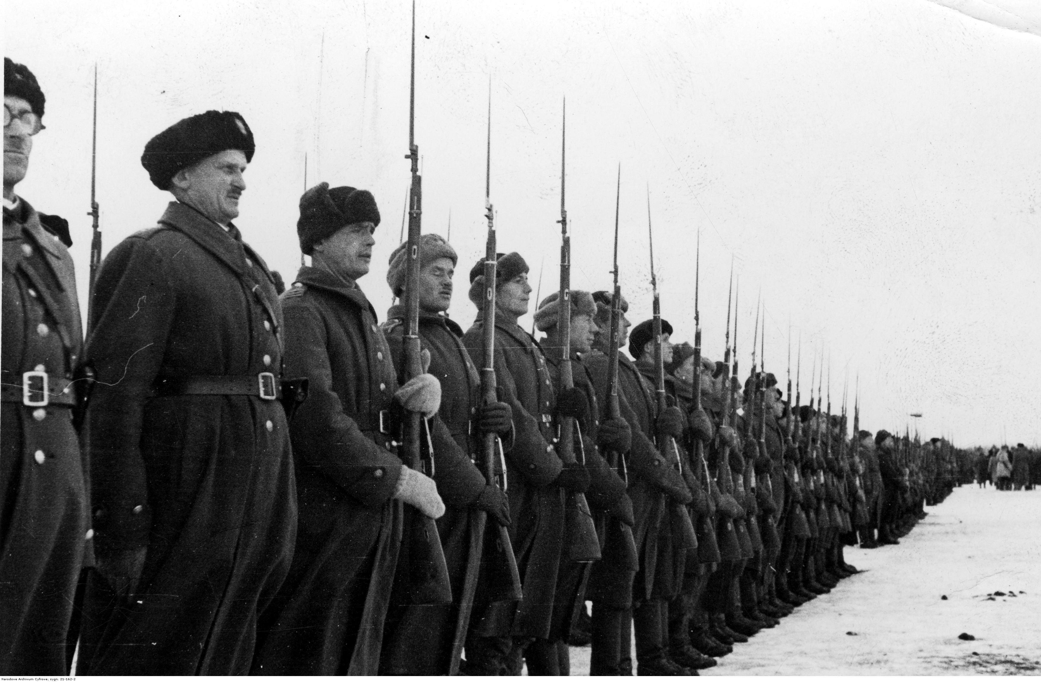 Żołnierze w dwuszeregu prezentują broń. Widoczne karabiny Mosin wz. 91/30 z bagnetami.